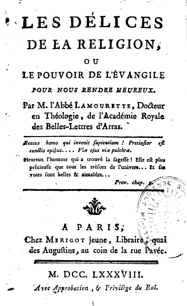 Antoine-Adrien Lamourette: Les délices de la religion où le pouvoir de l'évangile pour nous rendre heureux. Paris 1788, titre